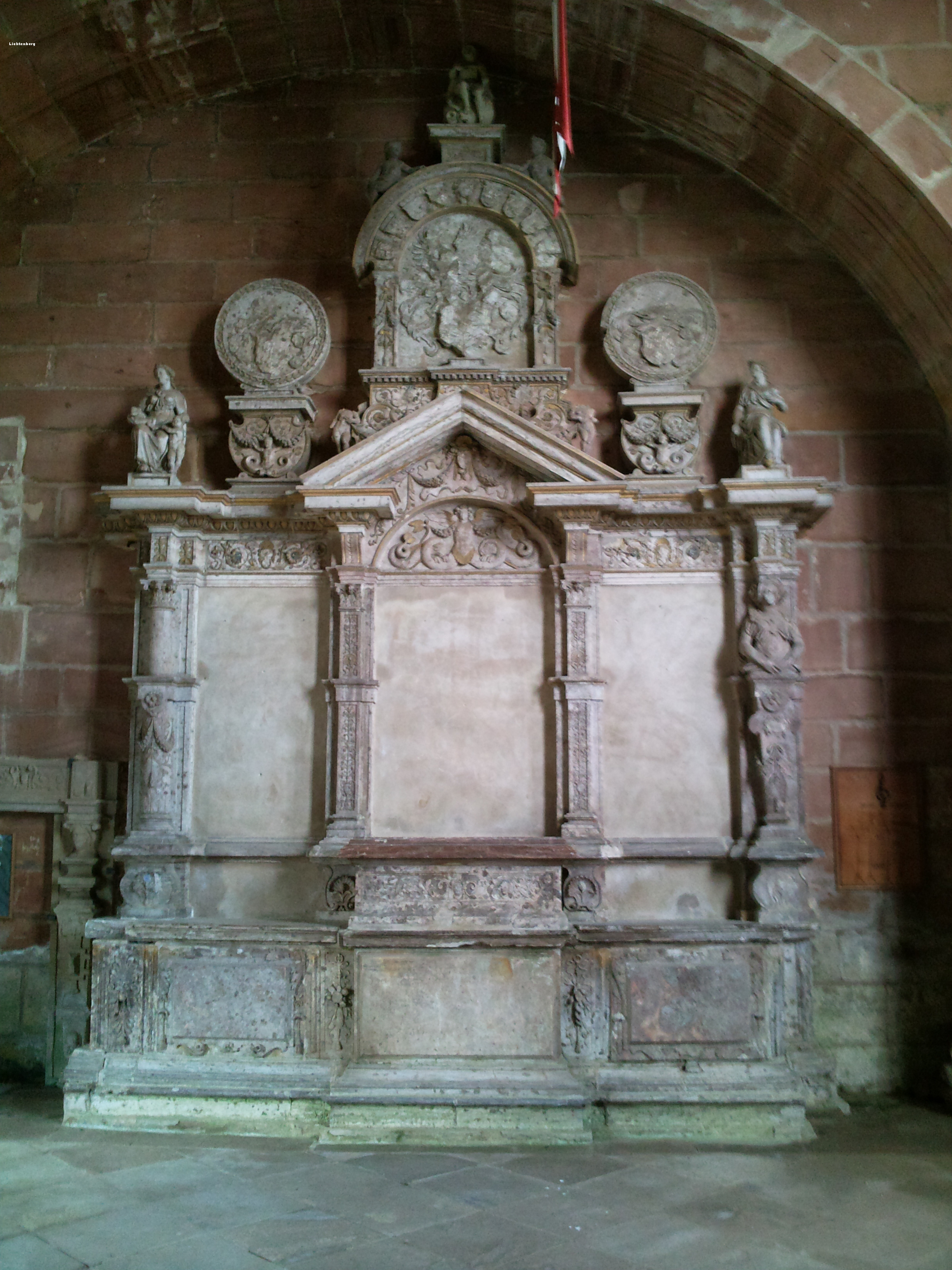 Mausolée du comte Philippe V de Hanau-Lichtenberg, chapelle du château de Lichtenberg, Alsace, France